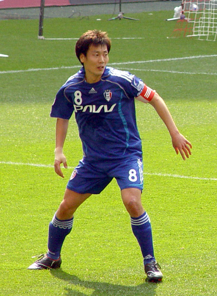 송종국. 서울월드컵경기장, 서울 대 수원 경기 중.